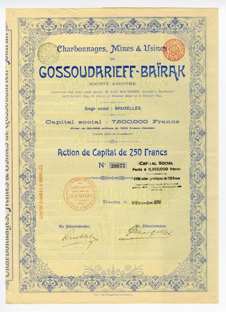 Акция в 250 бельгийских франков на предъявителя Анонимного общества Государево-Байракских каменноугольных копей, рудников и заводов с основным капиталом в 7,5 млн. бельгийских франков. Брюссель, 1899 г.